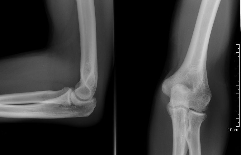 Radiographies du coude de face et de profil